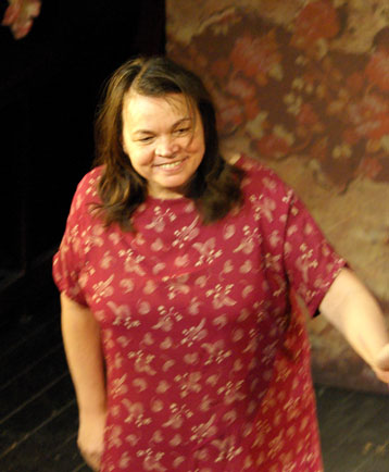 Myriam Boyer au Théâtre Marigny (Paris) le 17 février 2008 dans La Vie devant soi (saluts)